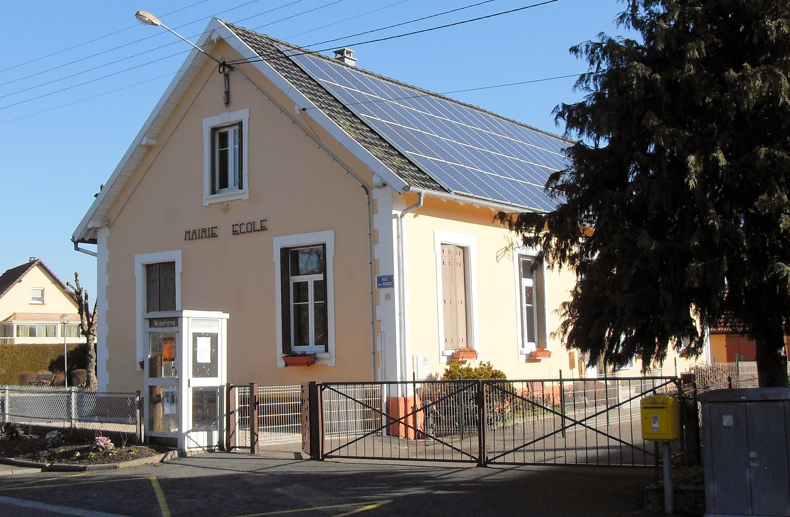 La mairie-école de Romagny-sous-Rougemont